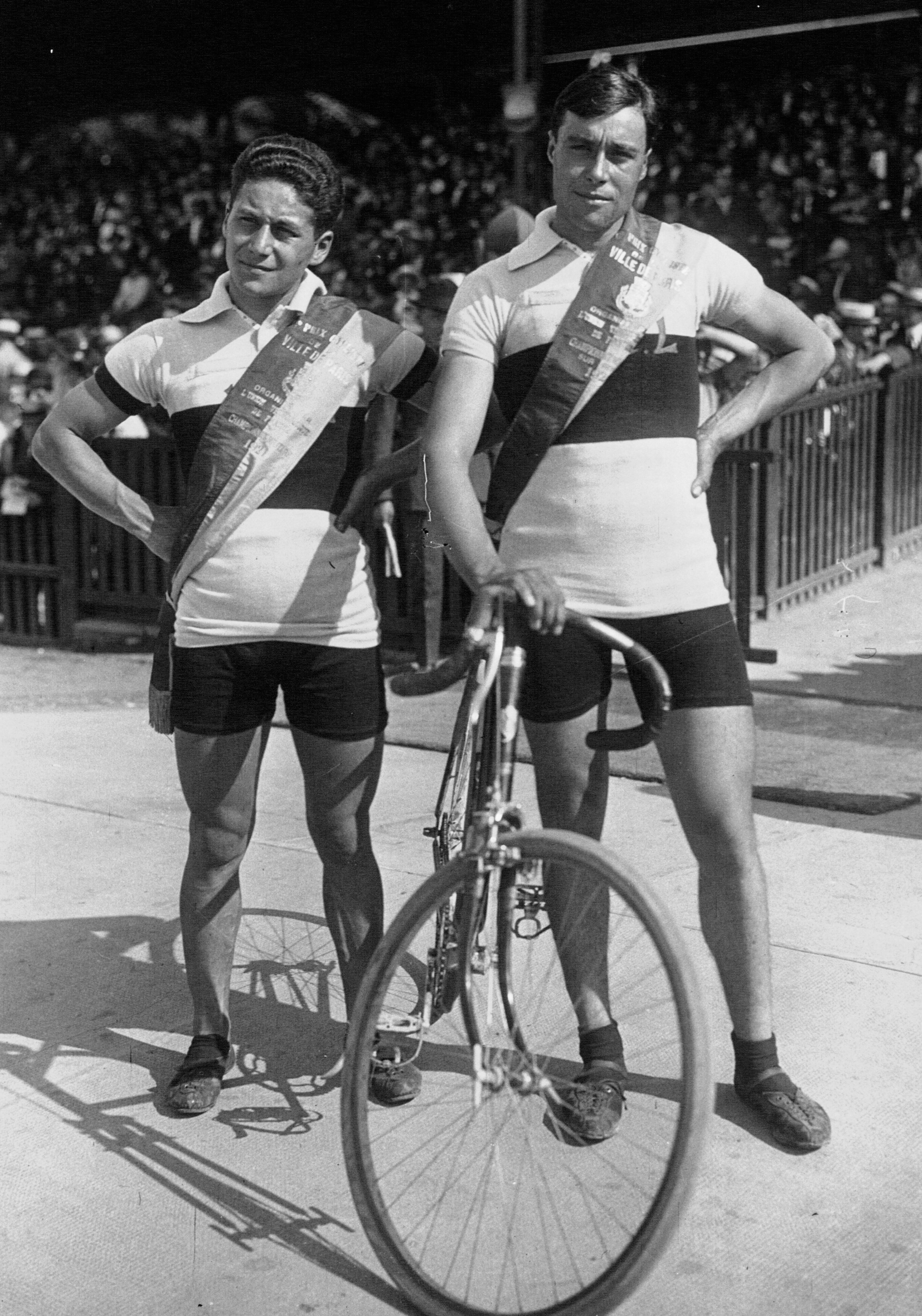 Grand Prix cycliste : Canteloube et Guyot (militaires) : [photographie de presse] / Agence Meurisse